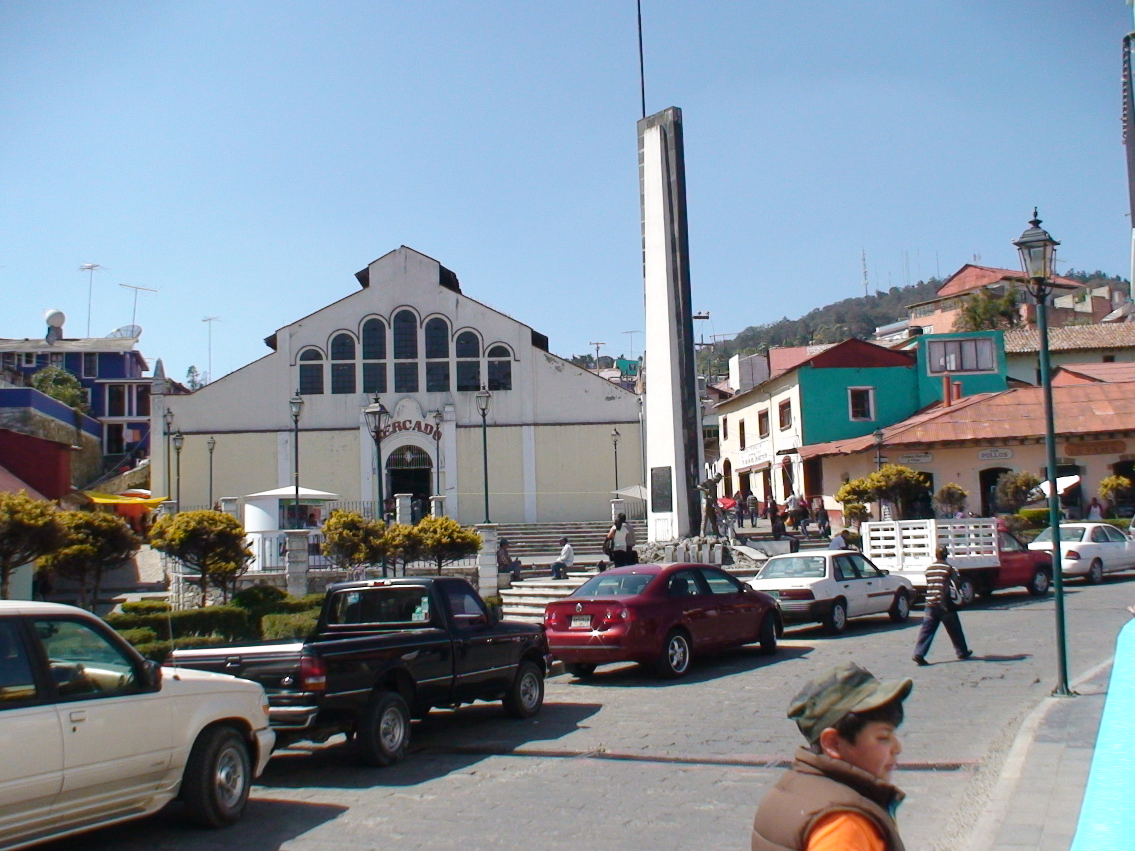 Mercado en el Pueblo Mágico de Real del Monte, Hidalgo, México